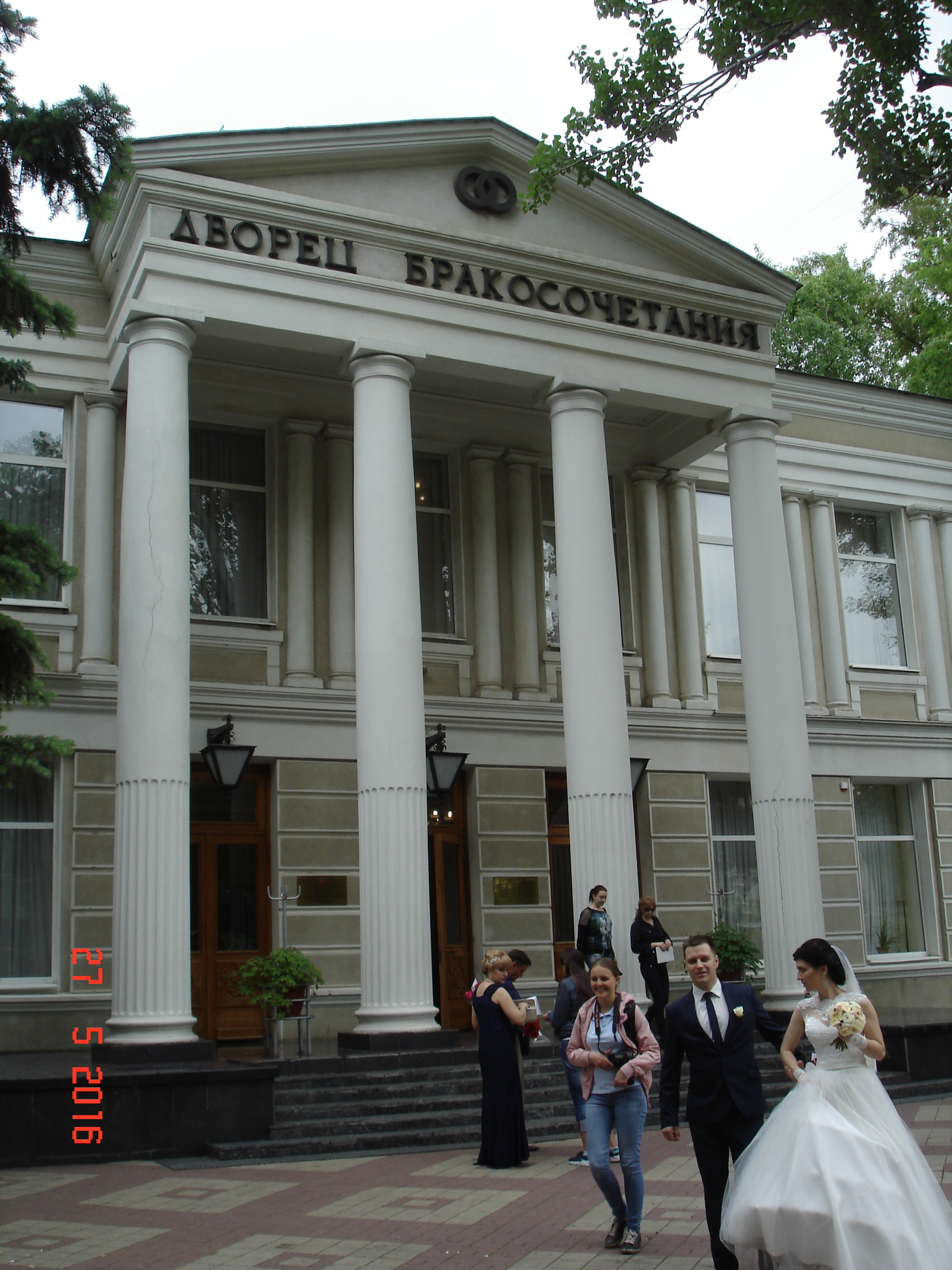 Дворец бракосочетания Ростова-на-Дону (Кировский район)